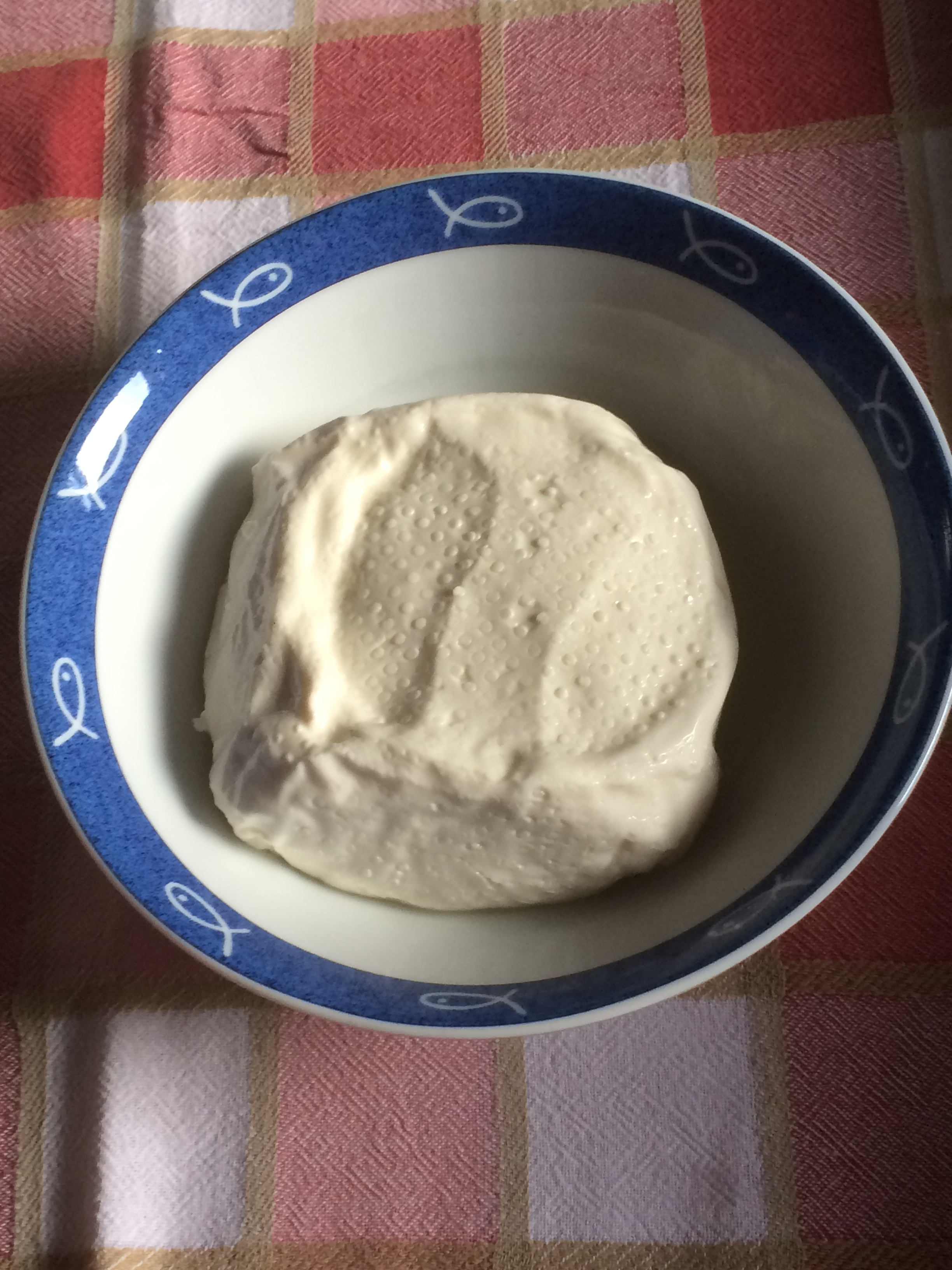 Squaquerone Romagnorlo